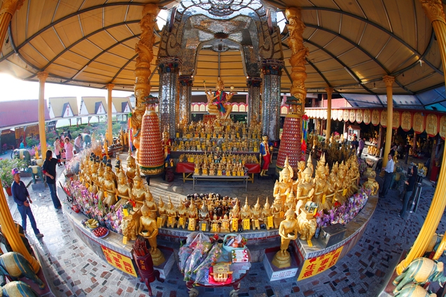 彰化四面佛寺-四面佛金身